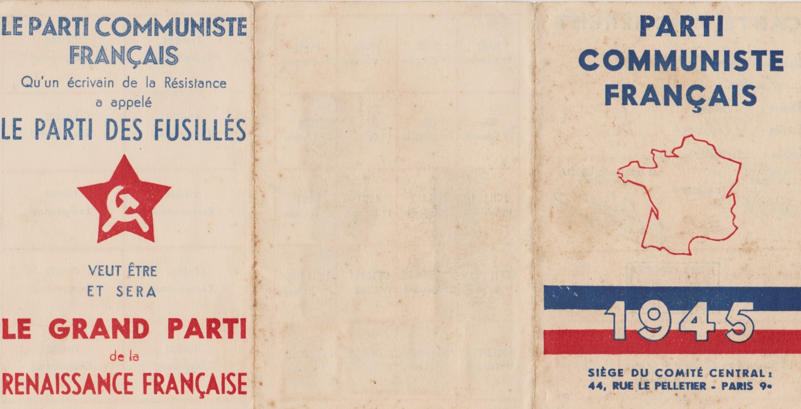 Carte du Parti communiste français pour l'année 1945, "appelé par un écrivain de la Résistance", Parti des fusillés (sans citer de chiffres) et de la renaissance française.